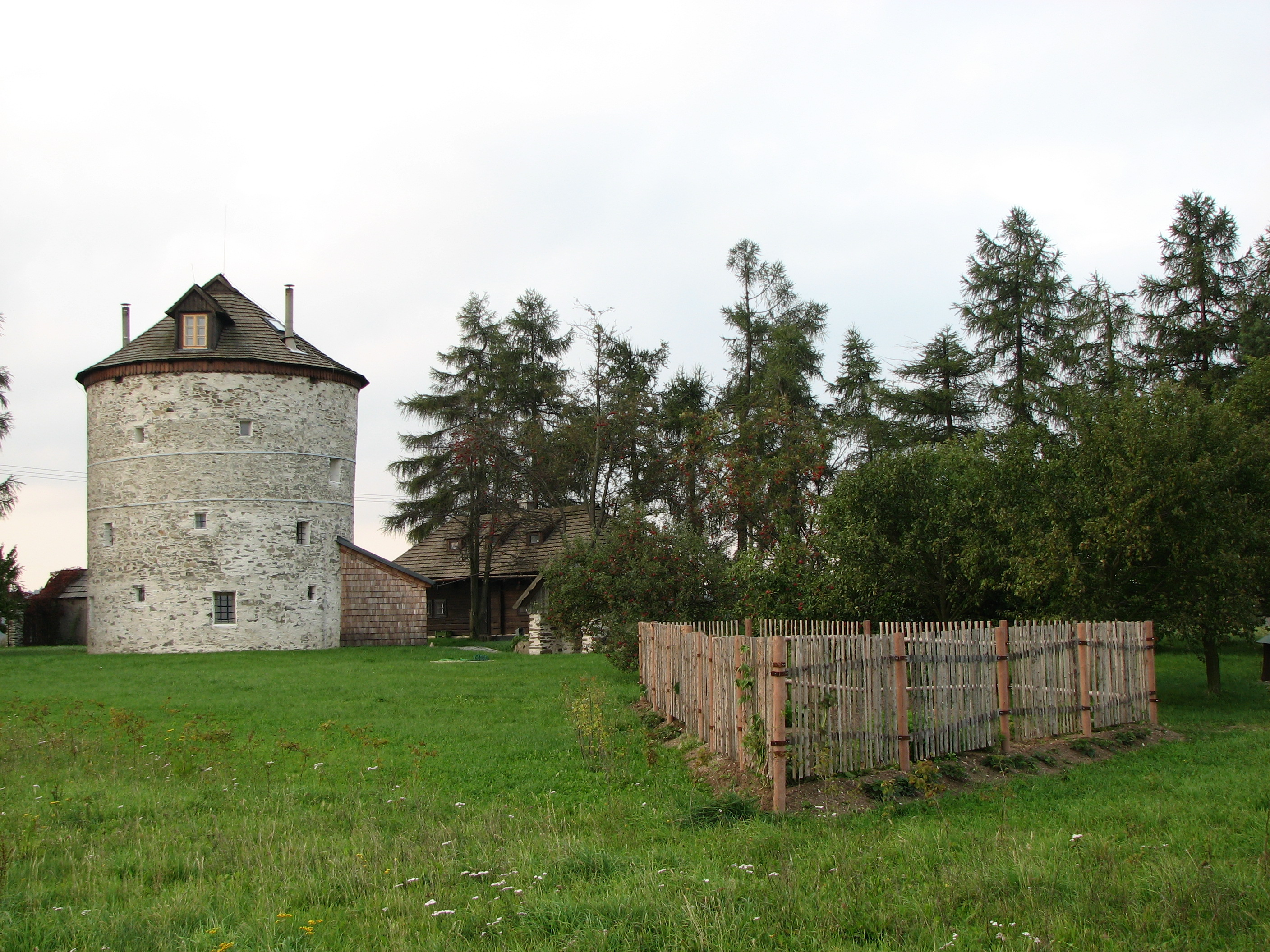 Větrný mlýn, Němčice 79, Němčice (okres Blansko).